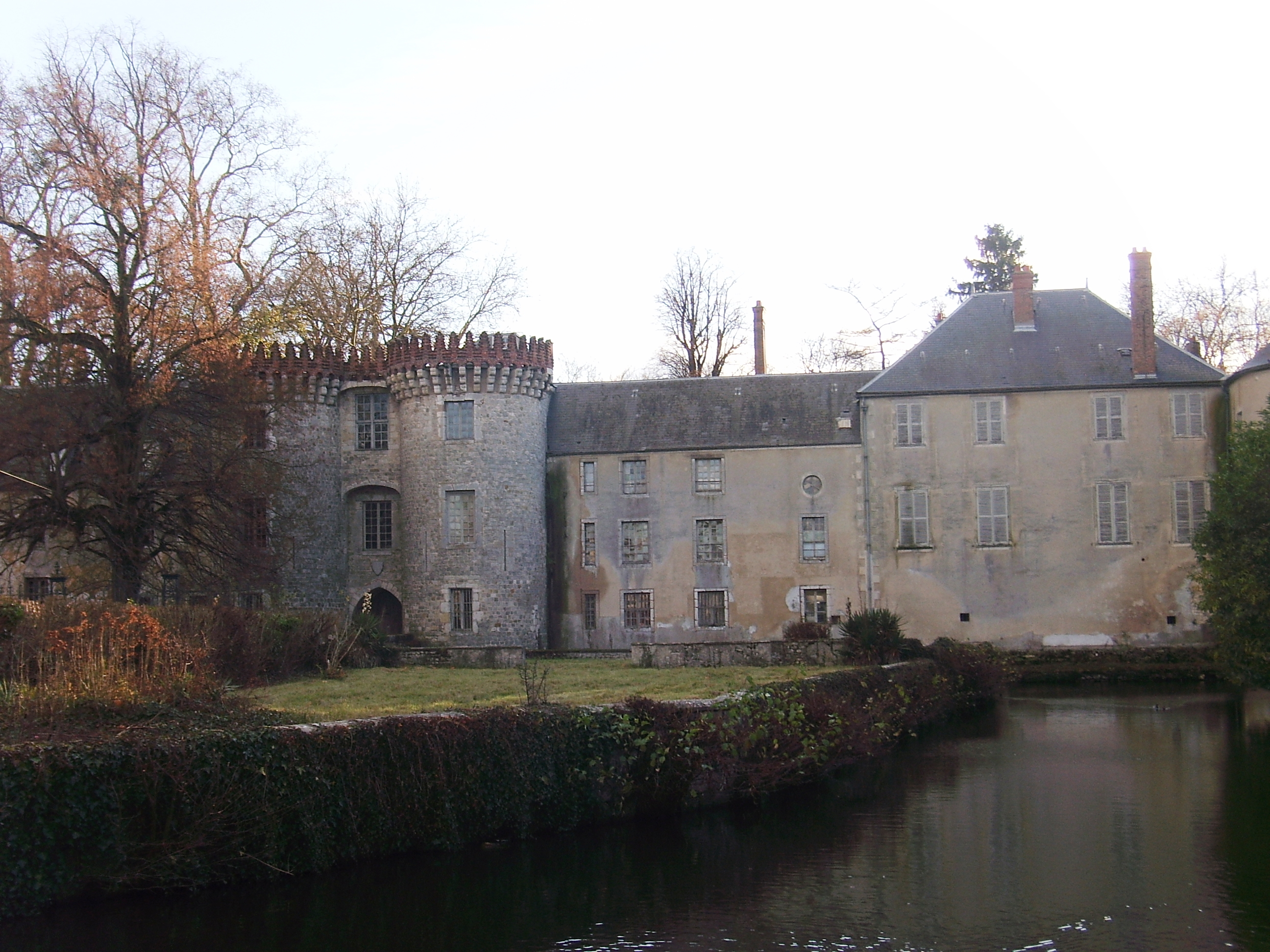 Château de Milly-la-Forêt (91)